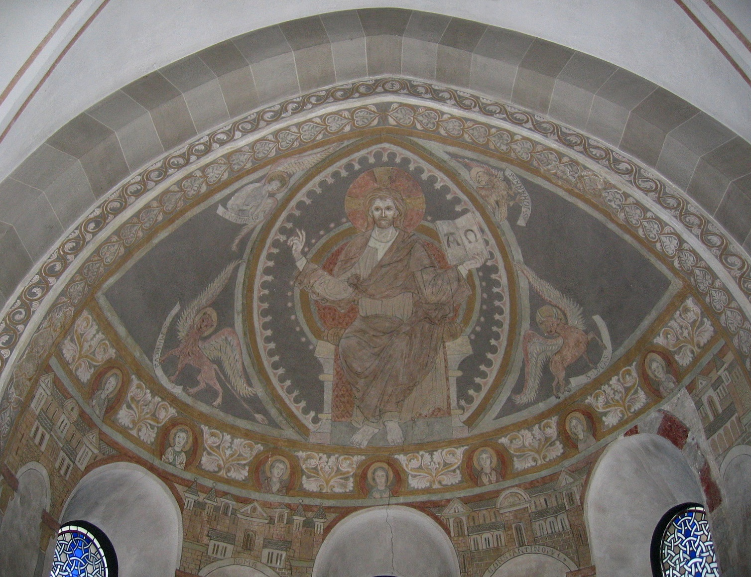 Deckenmalerei im Altarraum der „Spätromanischen Dorfkirche zu Wiblingwerde“ der Gemeinde Nachrodt-Wiblingwerde.